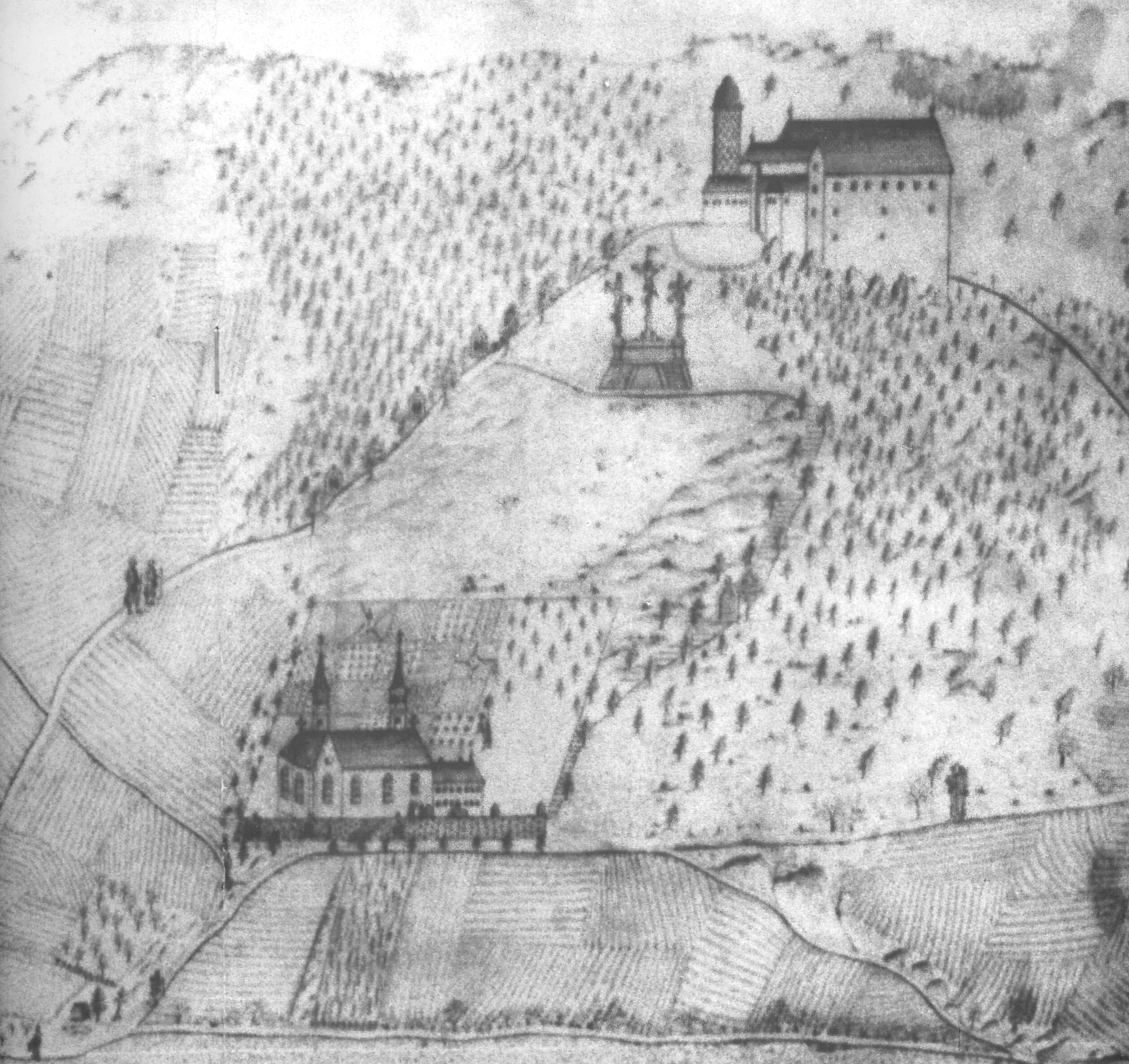 Kapellenkreuzweg Kloster Altstadt, Historische Zeichnung aus dem Jahr 1794.